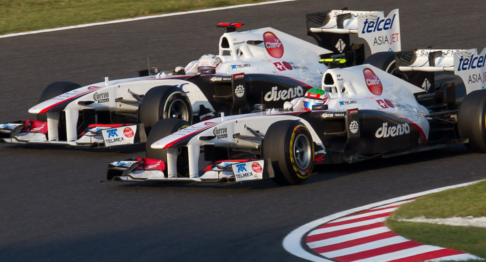 Formula One 2011 Rd.15 Japanese GP: Sergio Pérez (Sauber) overtaking Kamui Kobayashi (Sauber).